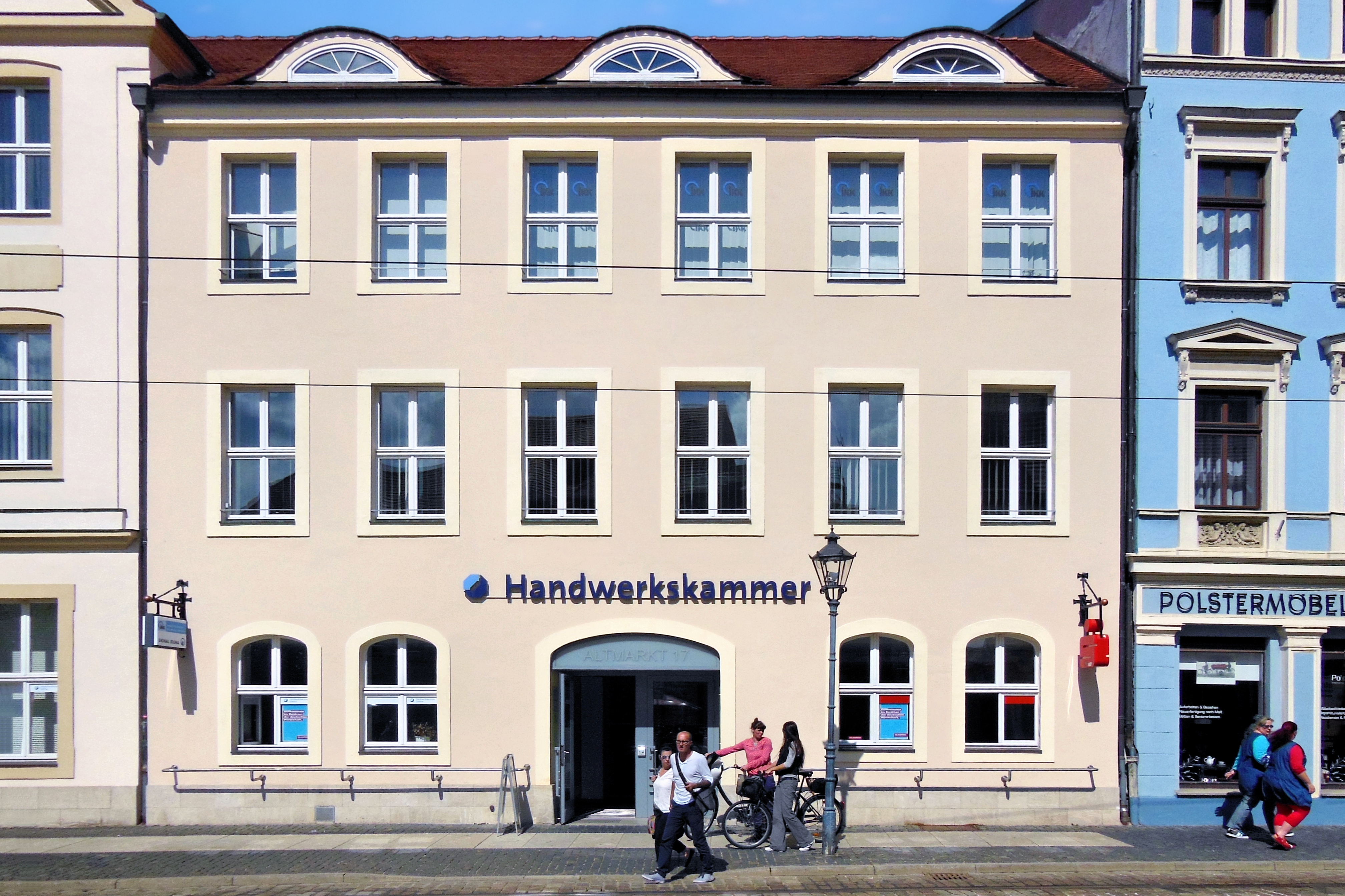 Gebäude der Handwerkskammer Cottbus